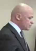 Справа Труханова: суд оголосив паузу в засіданні до 27 лютого. Солом'янський суд Києва розглядав клопотання прокурорів про відсторонення мера Одеси Геннадія Труханова з посади на час слідства. Чиновнику закидають фінансові оборудки, а тиждень тому відпустили на поруки. Нині зробили все, щоб сутички та стрілянина під судом більше не повторилась. Випуск ТСН.16:45 за 22 лютого 2018 року